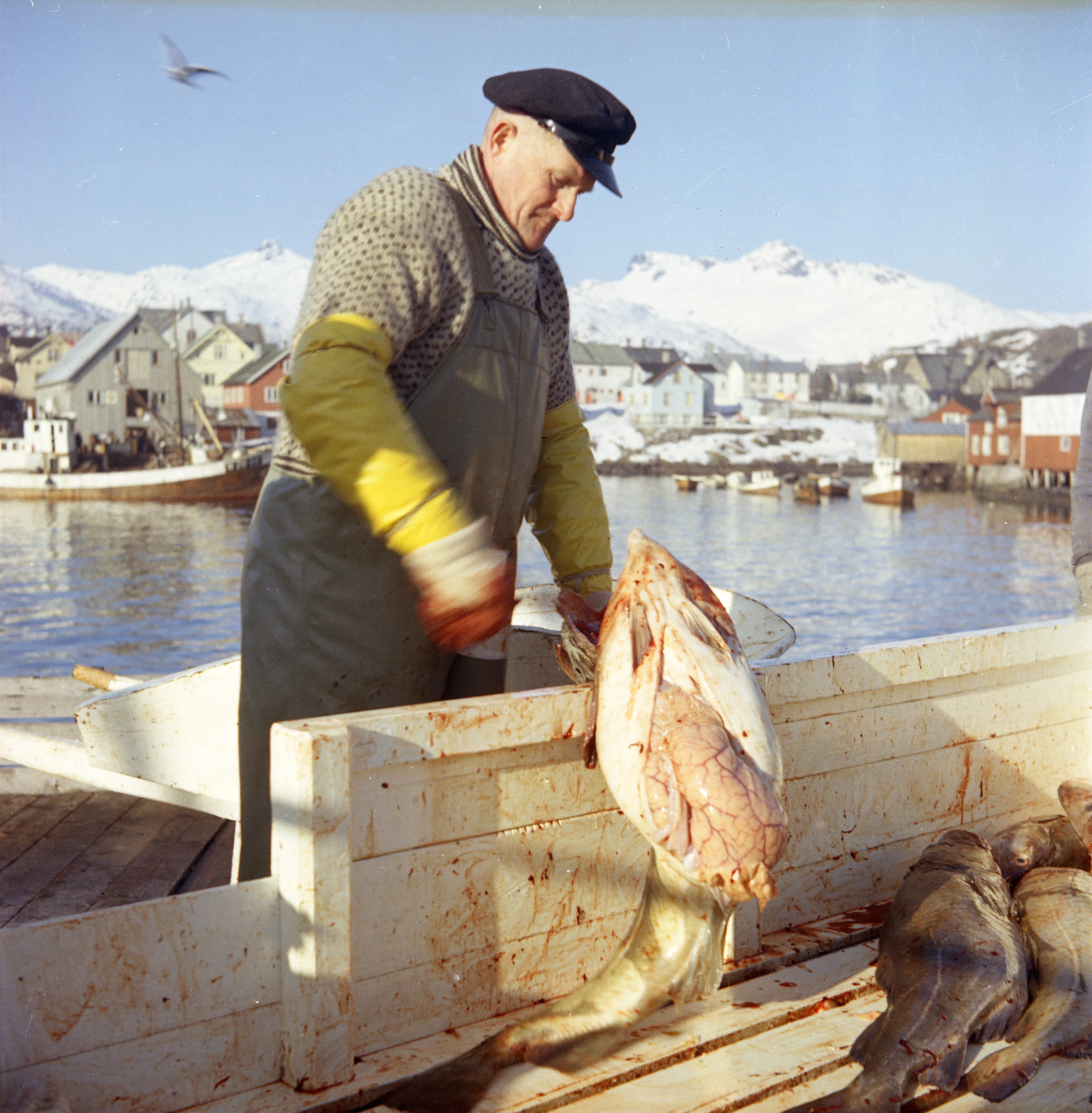 Bildet er hentet fra Nordlandsmuseet bildesamling etter Kanstad. Motivbeskrivelse: Sløying av fisk Nøkkelord: Marine industrier Drakt Kar og beholdere Havnevesen